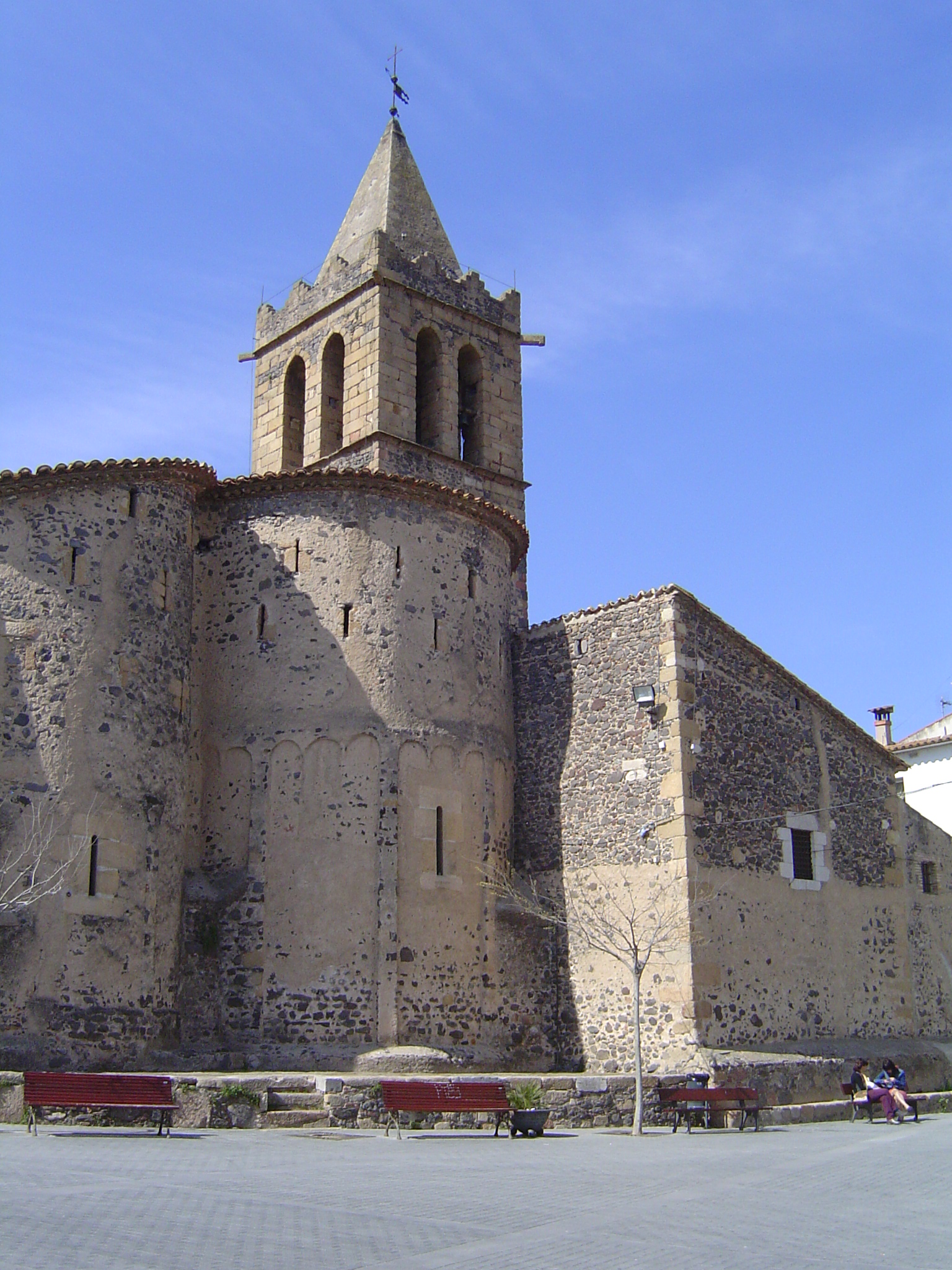 Massanet de la Selva - Església parroquial